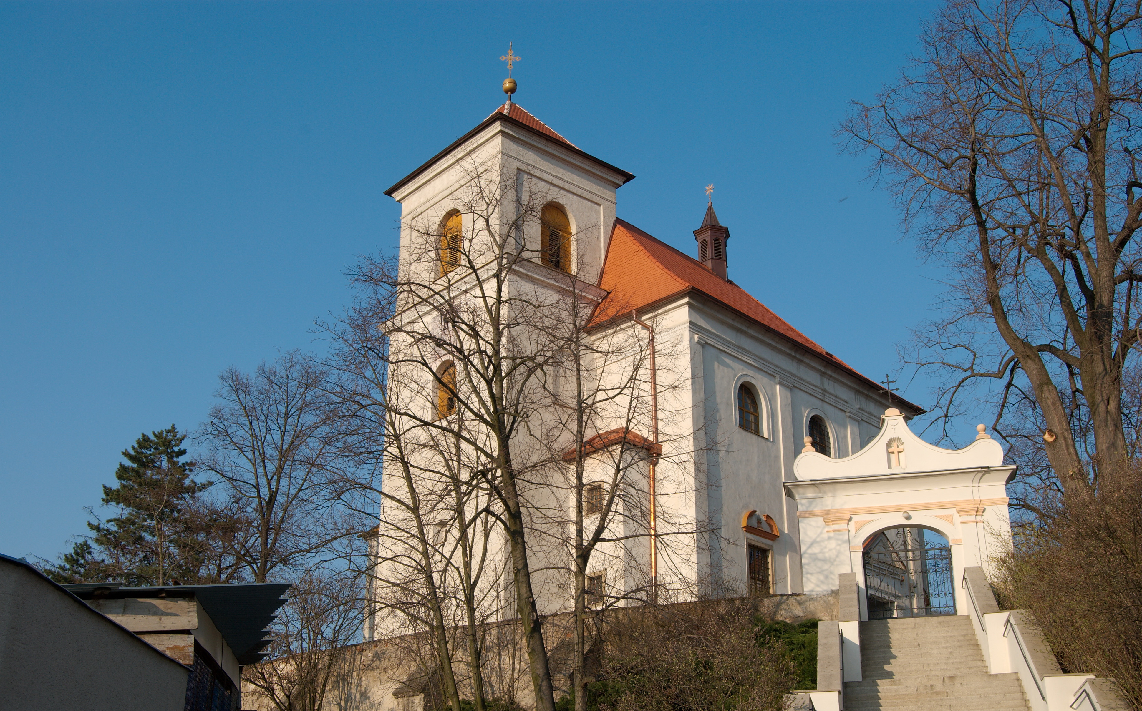 Brno-Obřany - kostel sv. Václava